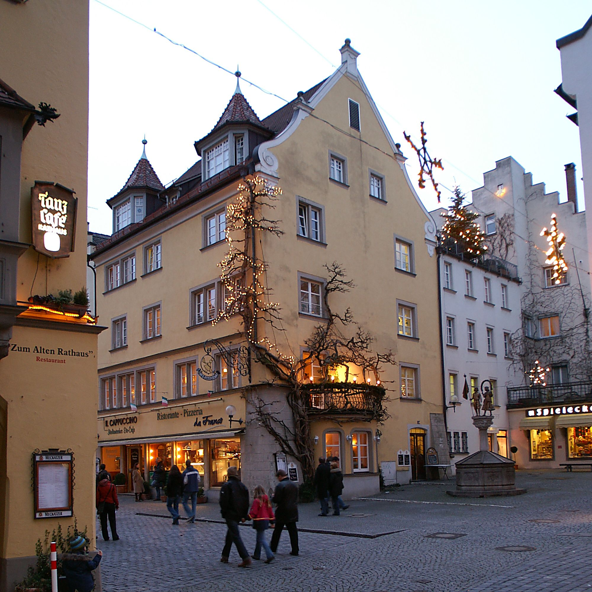 Lindau Insel am Bodensee.